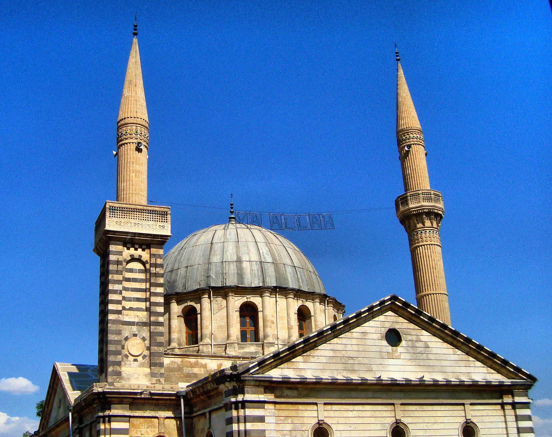 Kurtuluş camii-Aziz Gregor Ermeni Kilisesi-Gaziantep